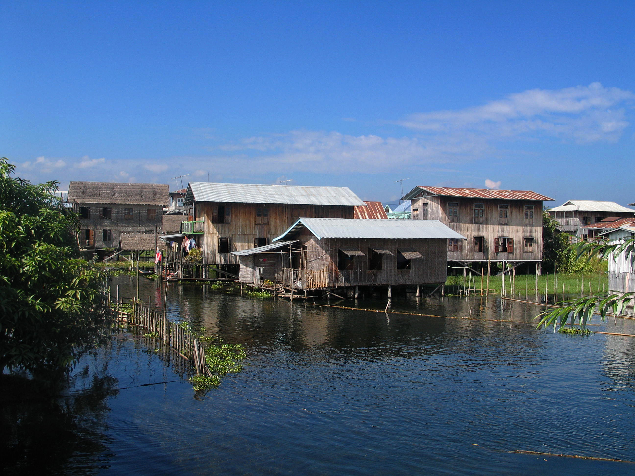 Życie na wodzie - jezioro Inle